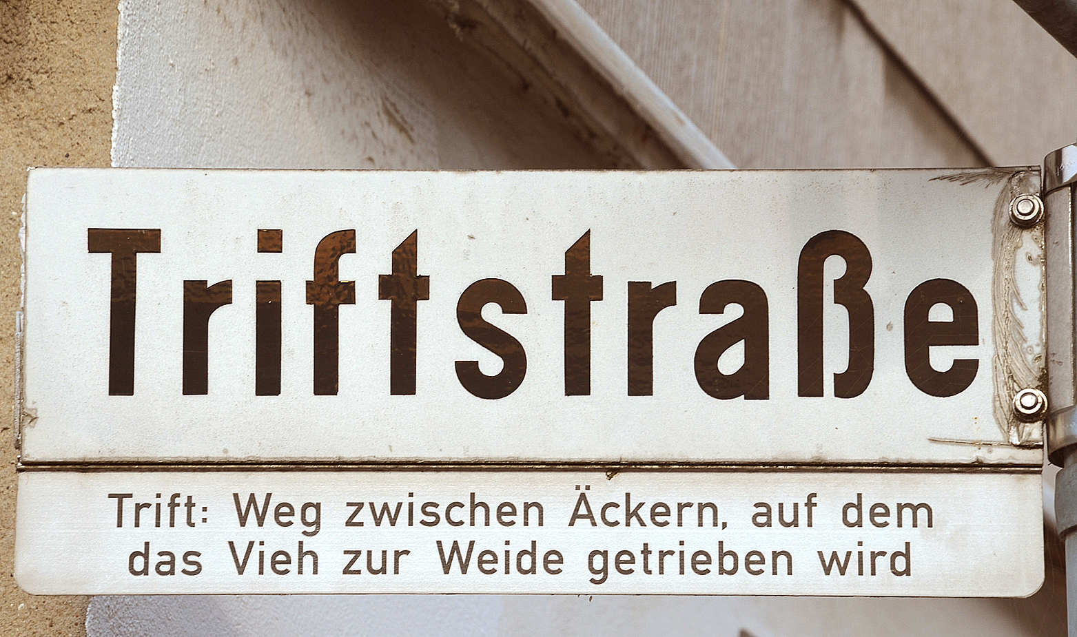 Straßenschild Triftstraße in Eldagsen mit einer gesondert angebrachten Legendentafel: „Trift: Weg zwischen Äckern, auf dem das Vieh zur Weide getrieben wird“ ...